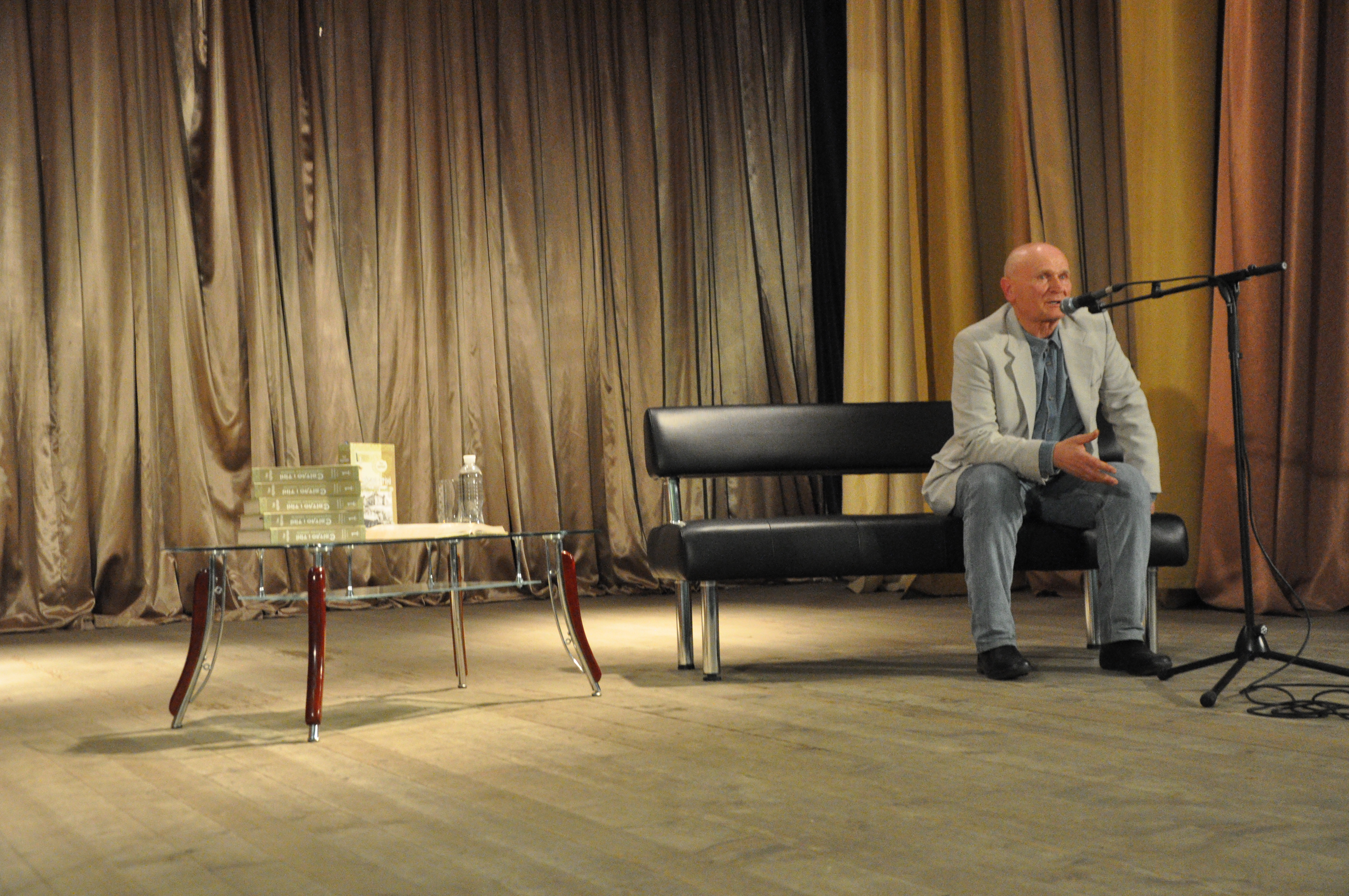 Петро Федоришин під час презентації власної книжки «Світло і тіні чортківських замків» в будинку культури м. Чорткова Тернопільської області.